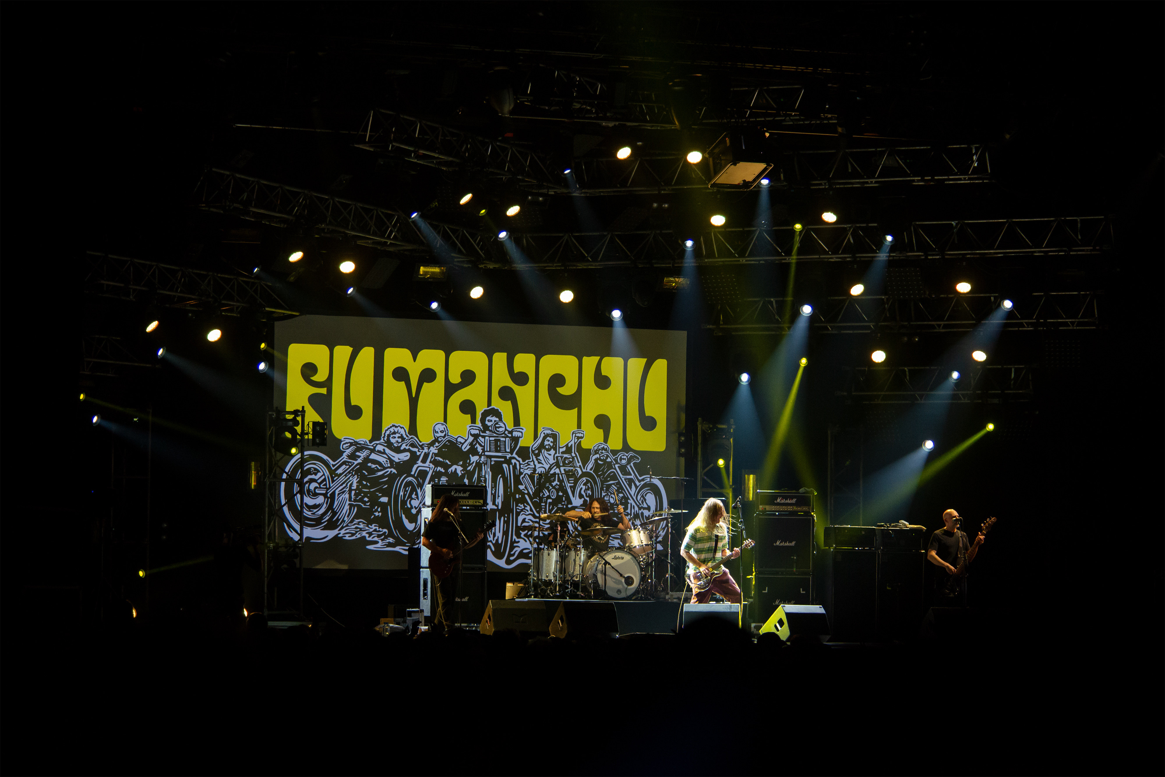 Concert de Fu Manchu au Hellfest 2019, Clisson, France.